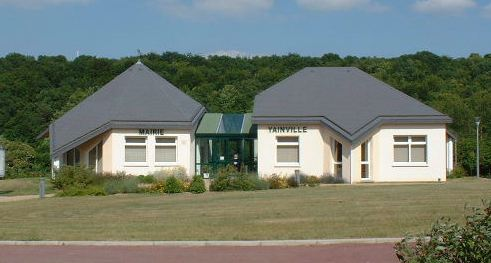 Mairie de Yainville